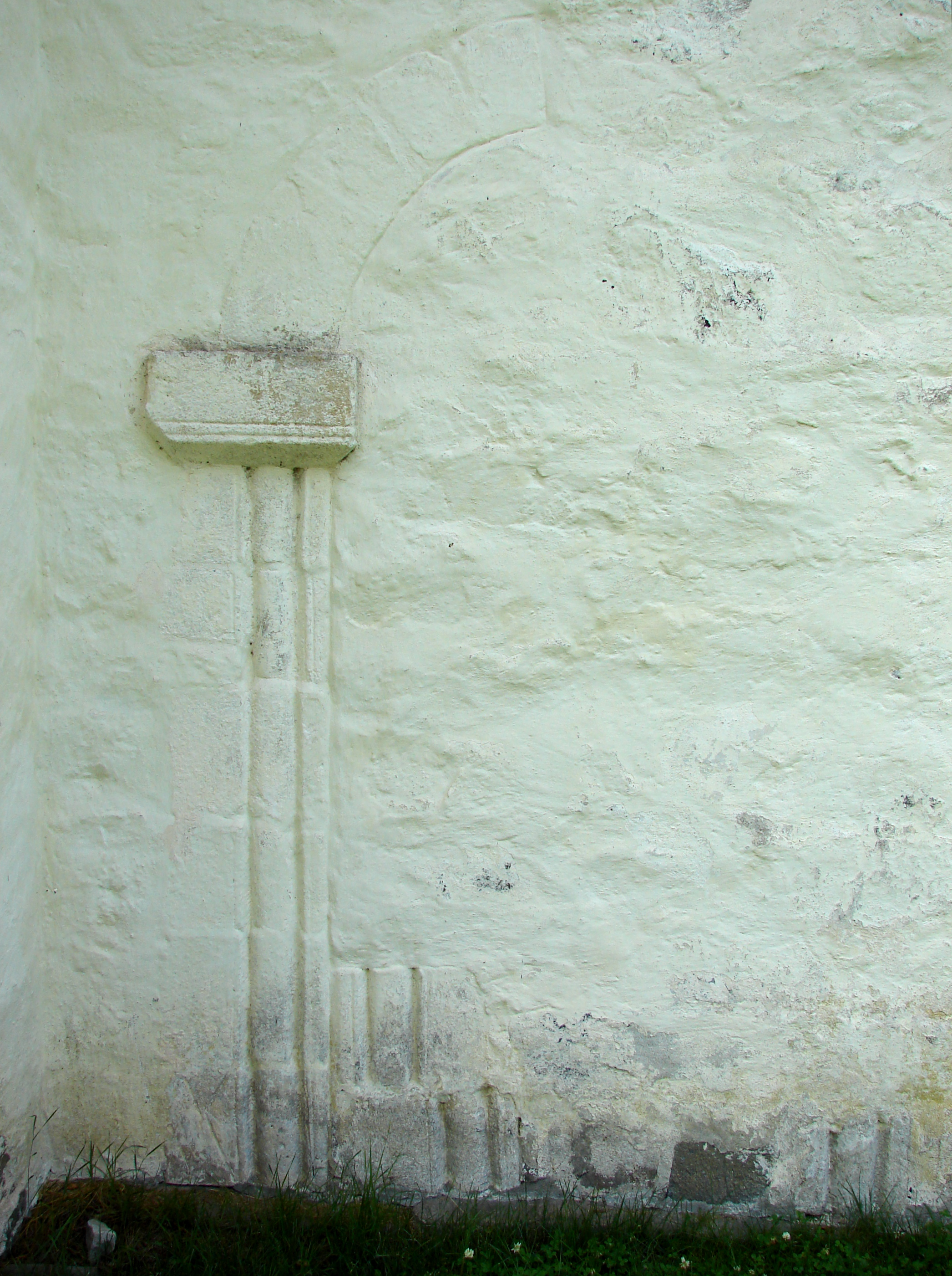 Detalje fra Romnes Kirke, Telemarken